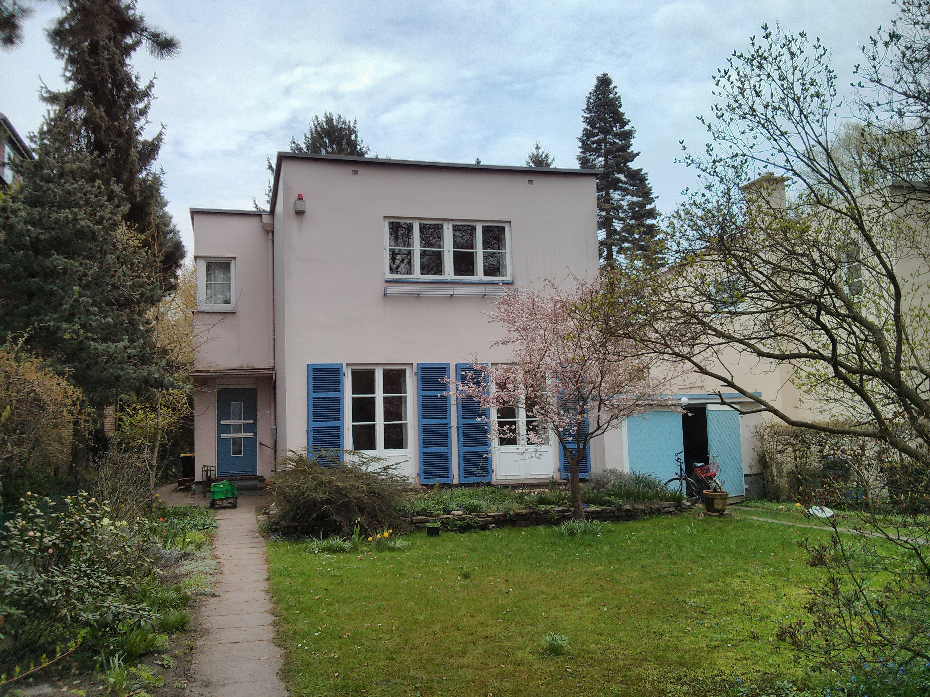 Haus Dr. Fertig in Bremen, Emmastraße 258 Das abgebildete Objekt ist ein geschütztes Kulturdenkmal in der Freien Hansestadt Bremen, mit der Nr. 0326 beim Landesamt für Denkmalpflege registriert.